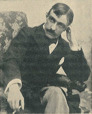 Fotografi af Herman Bang.